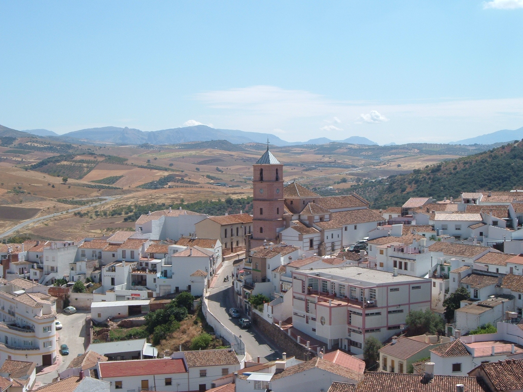 Vista del pueblo de Casabermeja (Málaga) en el mes de agosto.